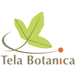 Logo carré de l'association Tela Botanica